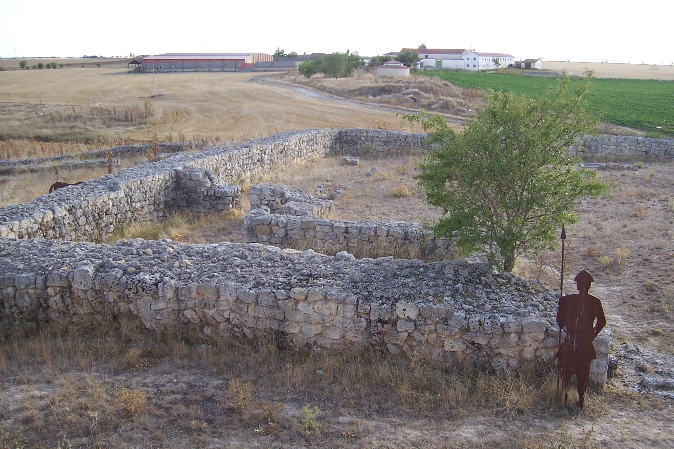 Yacimiento de un poblado medieval en Fuenteungrillo, localidad de Villalba de los Alcores, Valladolid, España. Reacreación con animales y personajes.